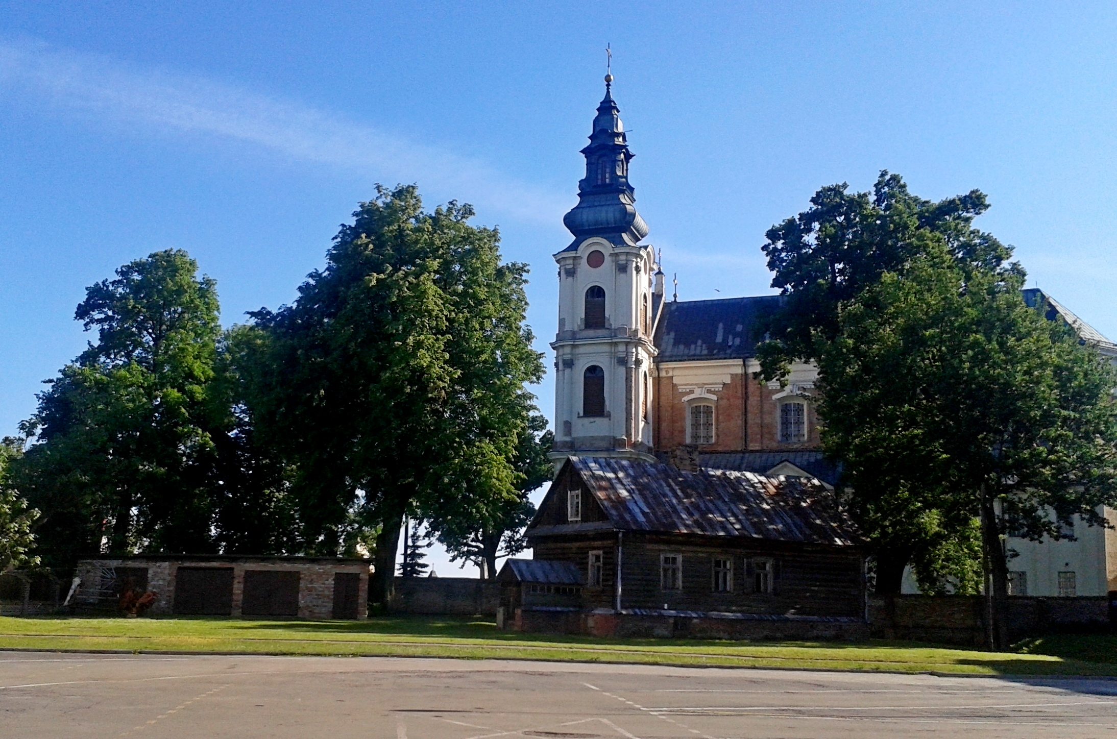 Kościół i Dom Ksieni (ihumeni) w Leśnej